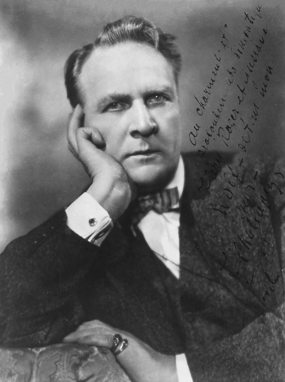 Feodor Chaliapine : [Mi-corps, profil 3/4 à dr.] : [Basse russe]